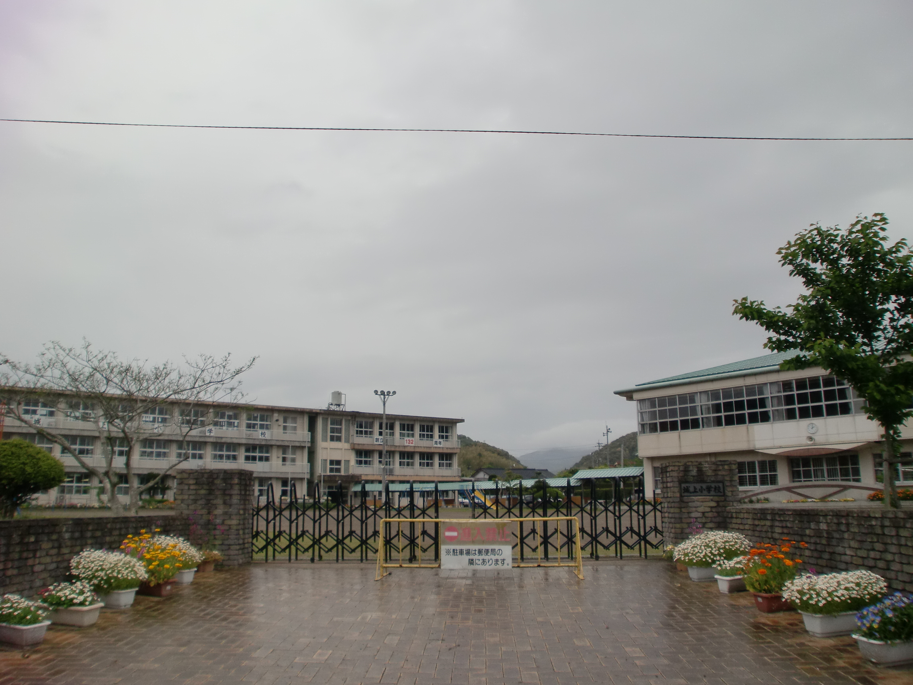 薩摩川内市立城上小学校の外観。